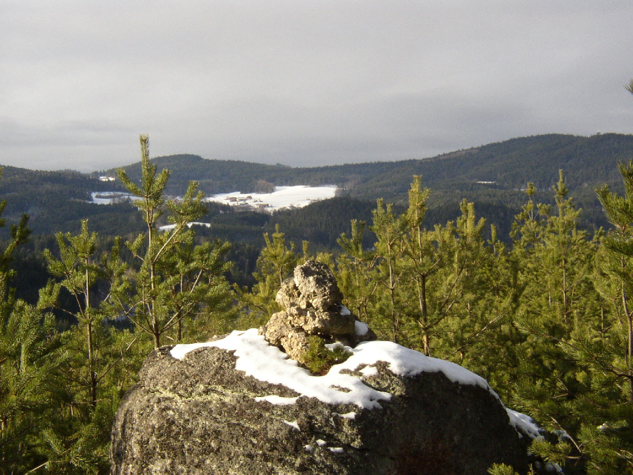 Waldviertel bei Weikertschlag, Gemeinde Bad Großpertholz